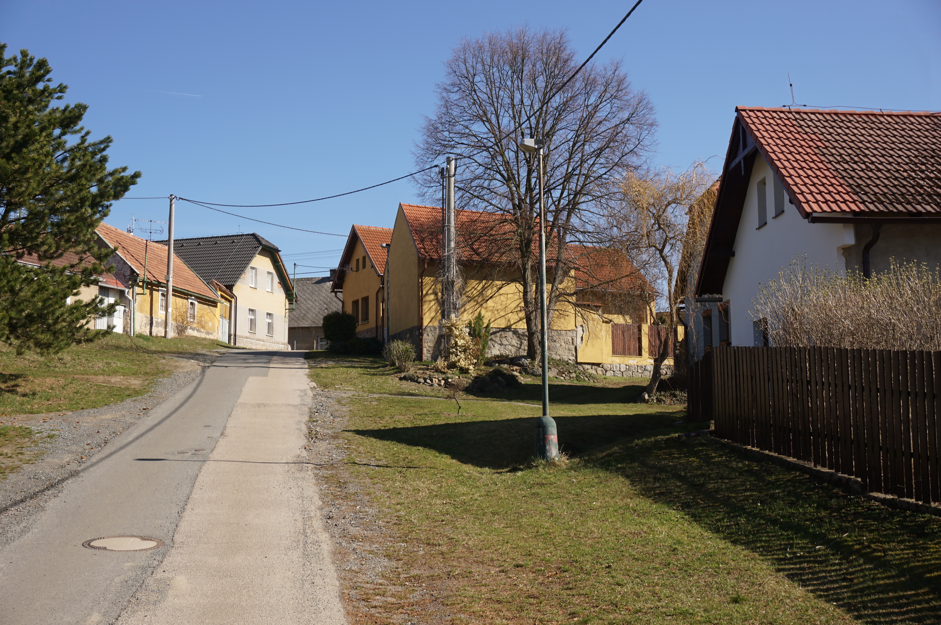 Božkov (u Mnichovic) - historická náves, dnes Svahová ulice